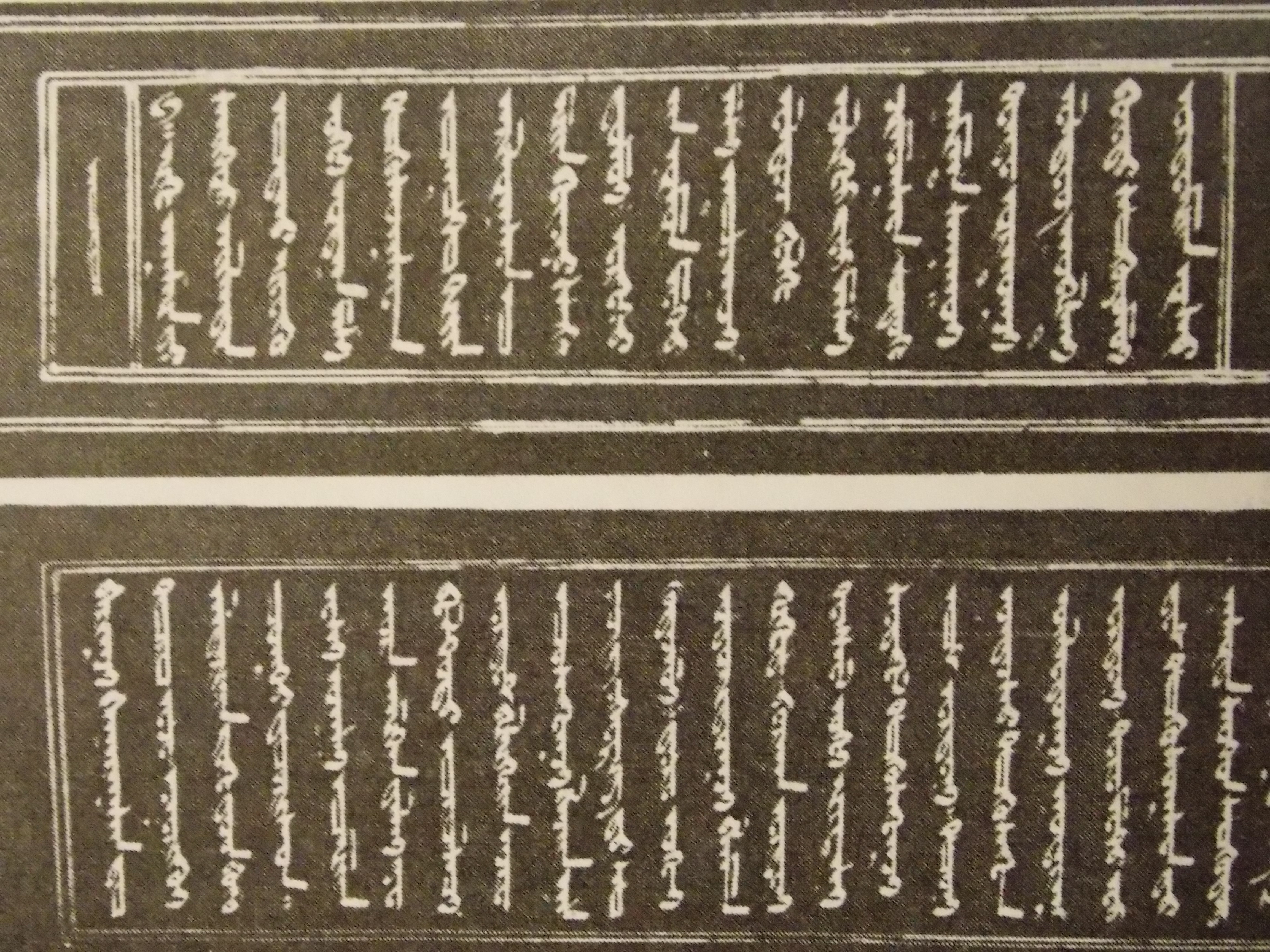 Раднабхадра, Лунный свет. Копия, сделанная гелюнгом Н. Шарманджиевым "Золотыми чернилами" на бумаге чёрного цвета, 1860 г. Библиотека Восточного факультета СПбГУ.